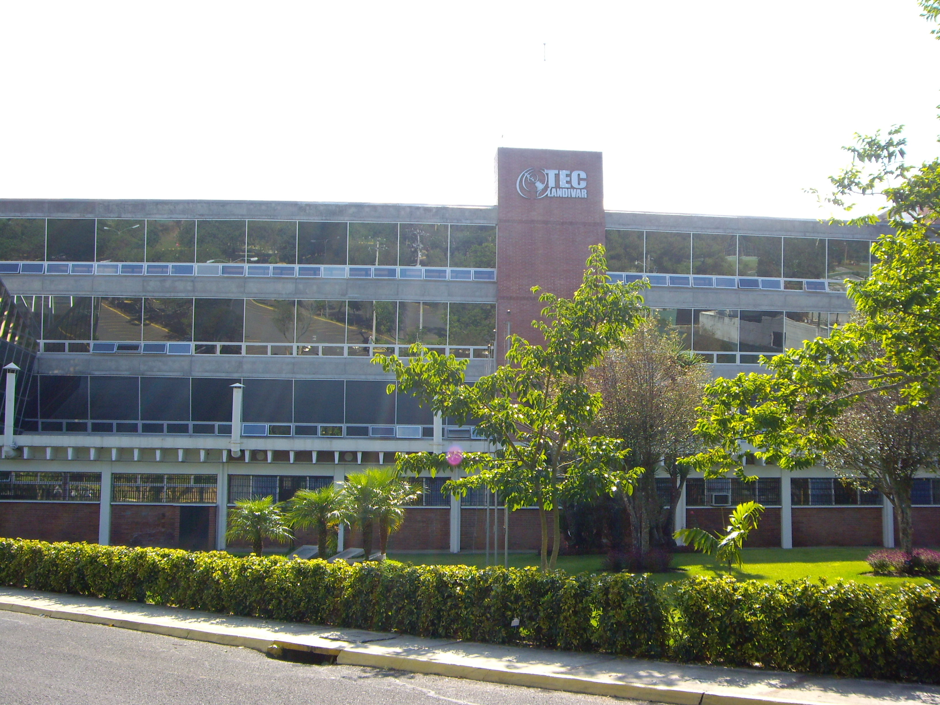 Edificio TEC Universidad Rafael Landivar, Guatemala